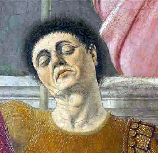 Particolare della Resurrezione di Piero della Francesca (Autoritratto)